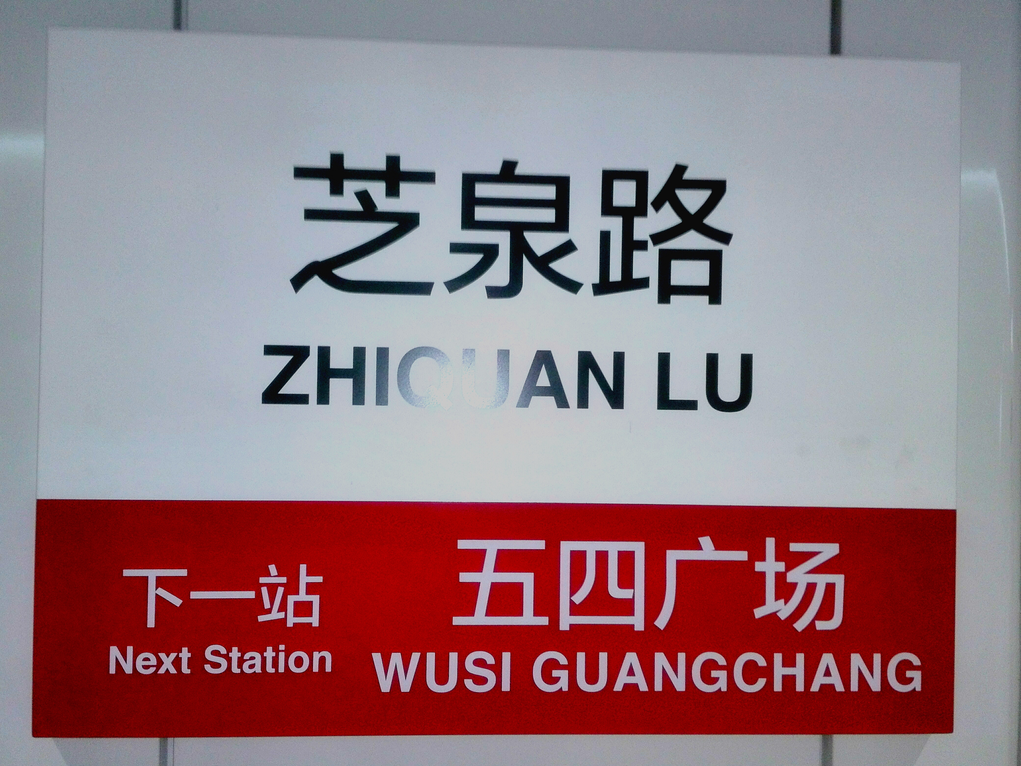 青岛地铁二号线芝泉路站站牌